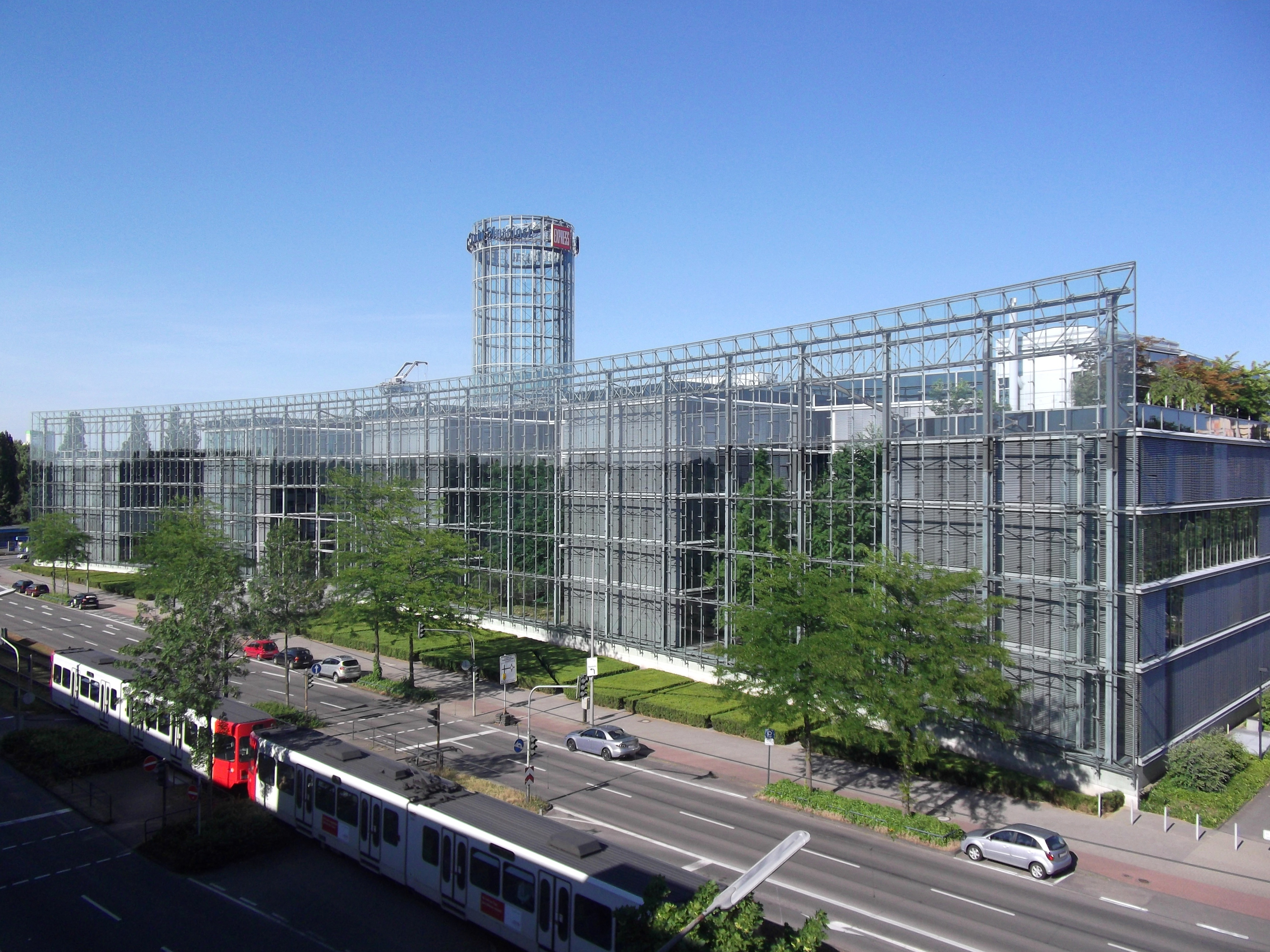 Cologne (Köln); Germany: Köln-Niehl: M. DuMont Schauberg: Amsterdamer Str. 192: Neven DuMont-Haus